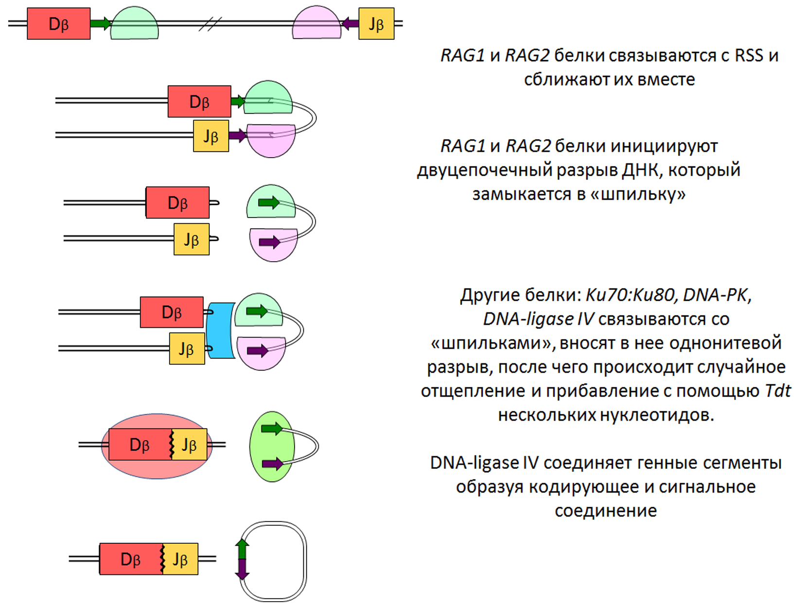 Молекулярный механизм V(D)J-реаранжировки с указанием ферментов и краткими комментариями